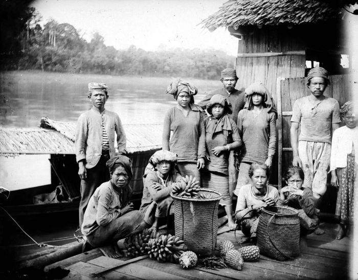 Negatief. Waar een stad is, is handel, zowel de tamelijk grootschalige import- en exporthandel, als de kleine handel die de stad van voedsel moet voorzien. Die kleine handel was, net als bijna overal in Indië, grotendeels in handen van vrouwen, maar ook Chinese mannen speelden vaak een rol. Hier betreft het Dajakse vrouwen die met hun waren de rivier de Barito zijn komen afzakken. In dit geval gaat het om vruchten, waarvan een deel (de bananen) ongetwijfeld van eigen erf afkomstig is. De plaats van handeling is een vlot met huisje (rakit) in de Barito. (P. Boomgaard, 2001). Dajak vrouwen verkopen vruchten vanaf een vlot op de Barito-rivier bij Bandjermasin, Zuid-Borneo